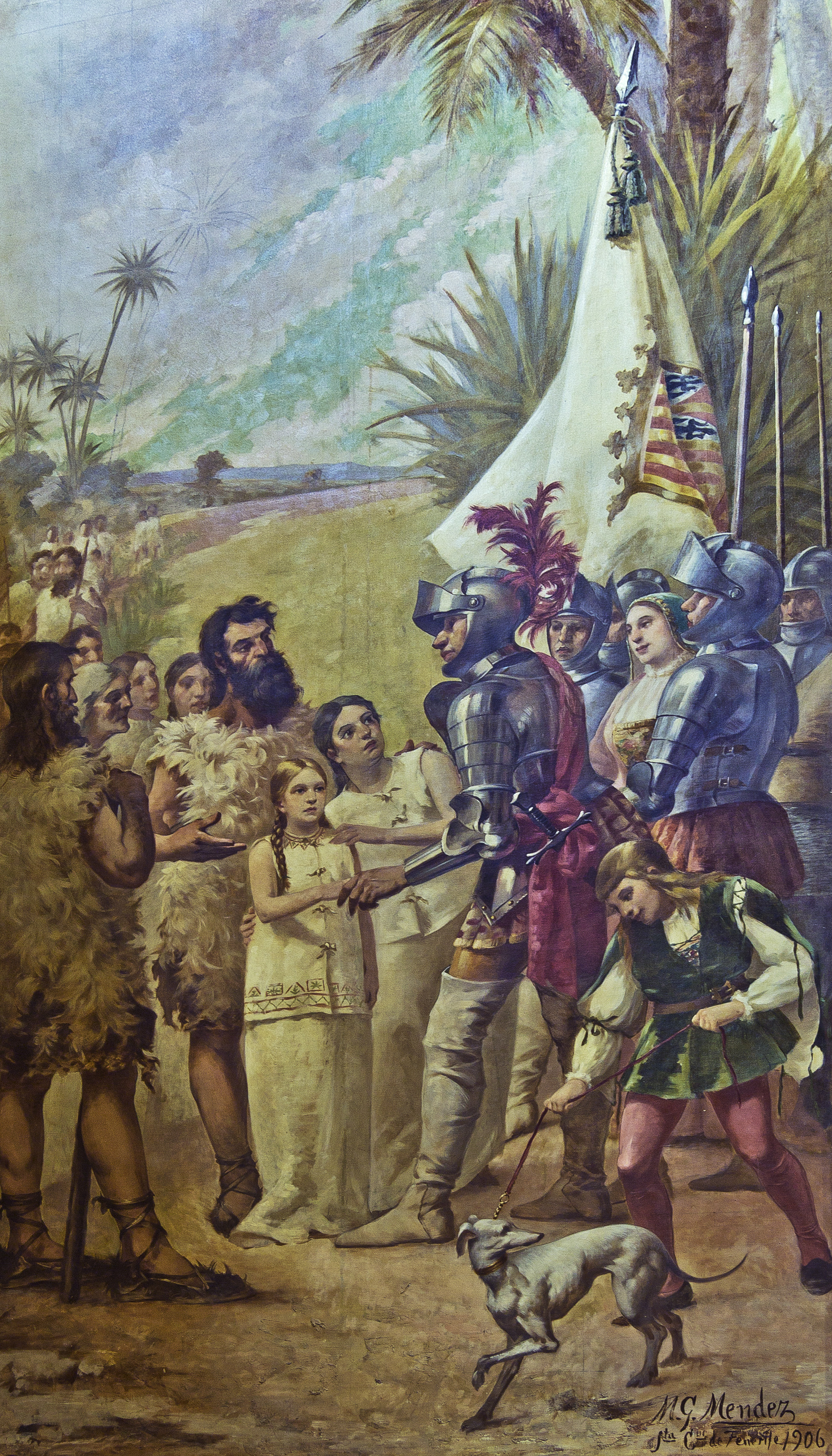 Das Bild „El Adelantado y los guanches“ wurde zu Beginn des 20. Jahrhunderts von Manuel Gonzalez Mendez geschaffen. Es befindet sich an der Stirnwand des Kanarischen Parlaments in Santa Cruz de Tenerife.